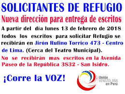 Solicitantes de Refugio Venezolano en Perú